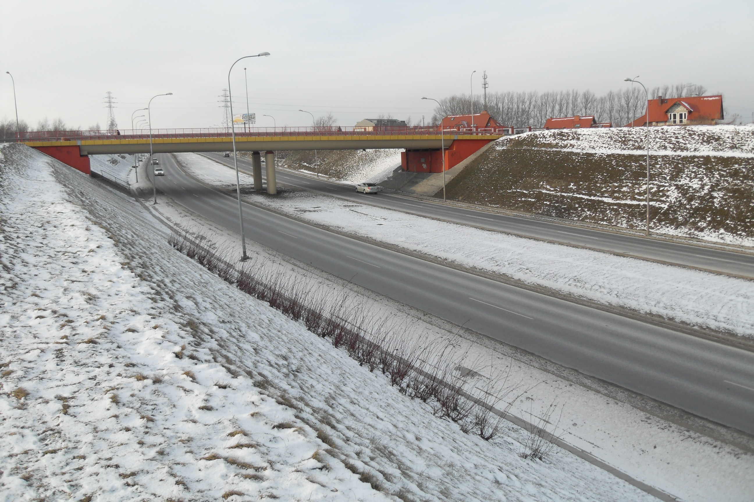 Trasa W-Z w Gdańsku Jasieniu, widok w kierunku wyjazdu z miasta. Wiadukt ul. Leszczynowa.